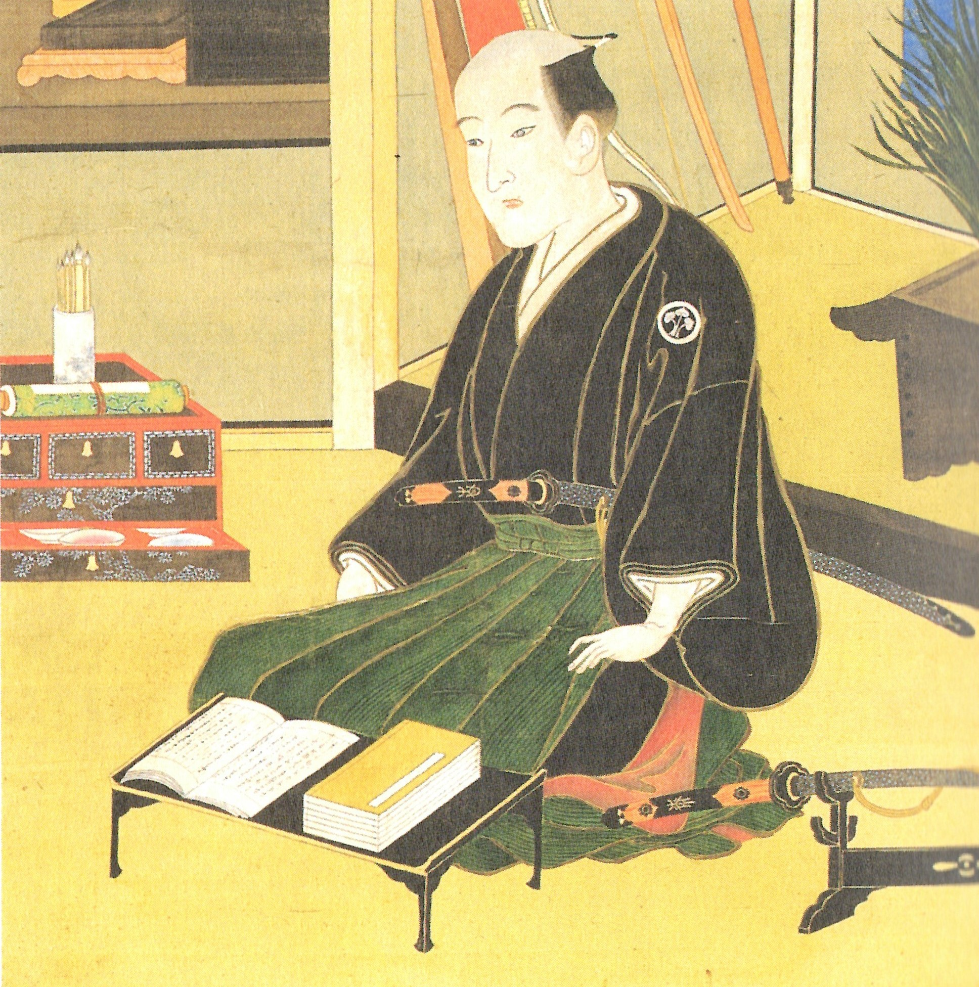 本多康伴の肖像。